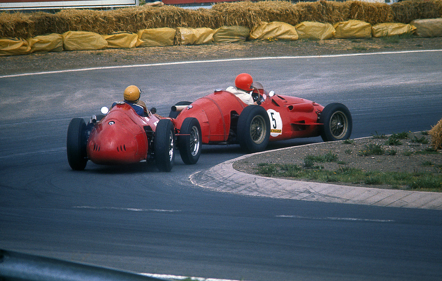 Maserati 250 F, Baujahr 1955